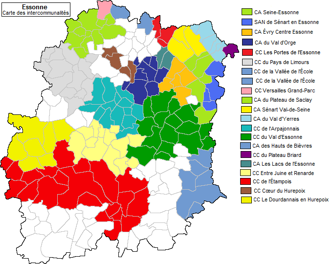 Carte des intercommunalités en Essonne en 2005.